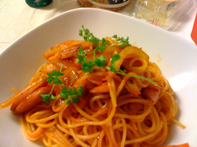 Naporitan